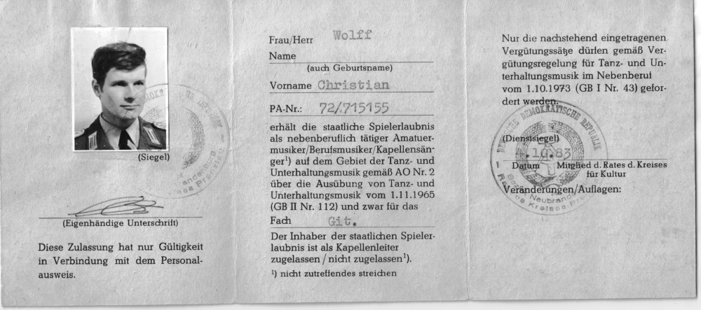 Staatliche Spielerlaubnis der ehemaligen DDR, Innenteil des zusammenklappbaren Ausweises